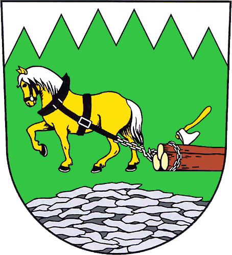 Znak obce Holčovice